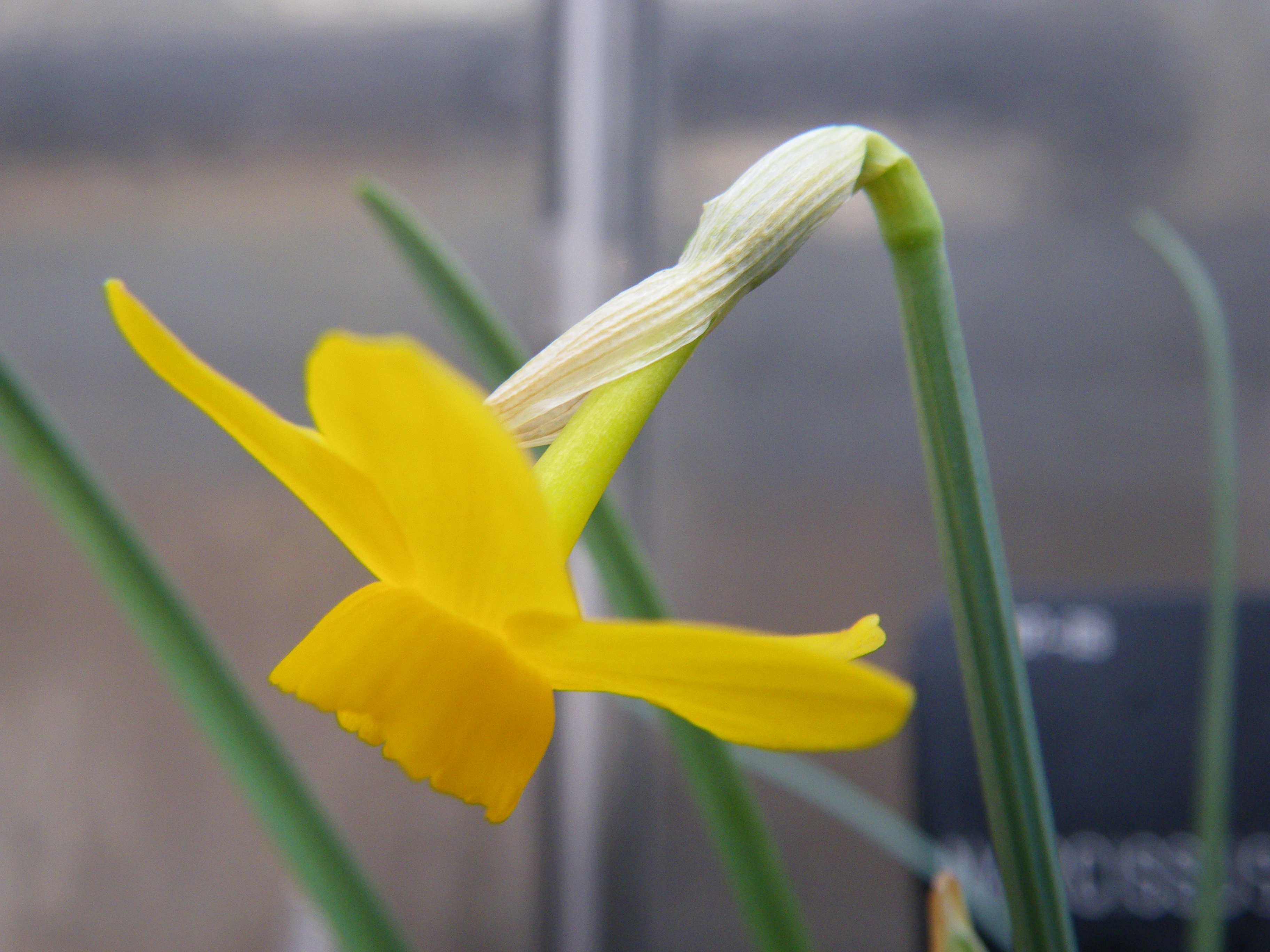 Narcissus cuatrecasasii Fern.Casas & al. Real Jardín Botánico, Madrid, España.